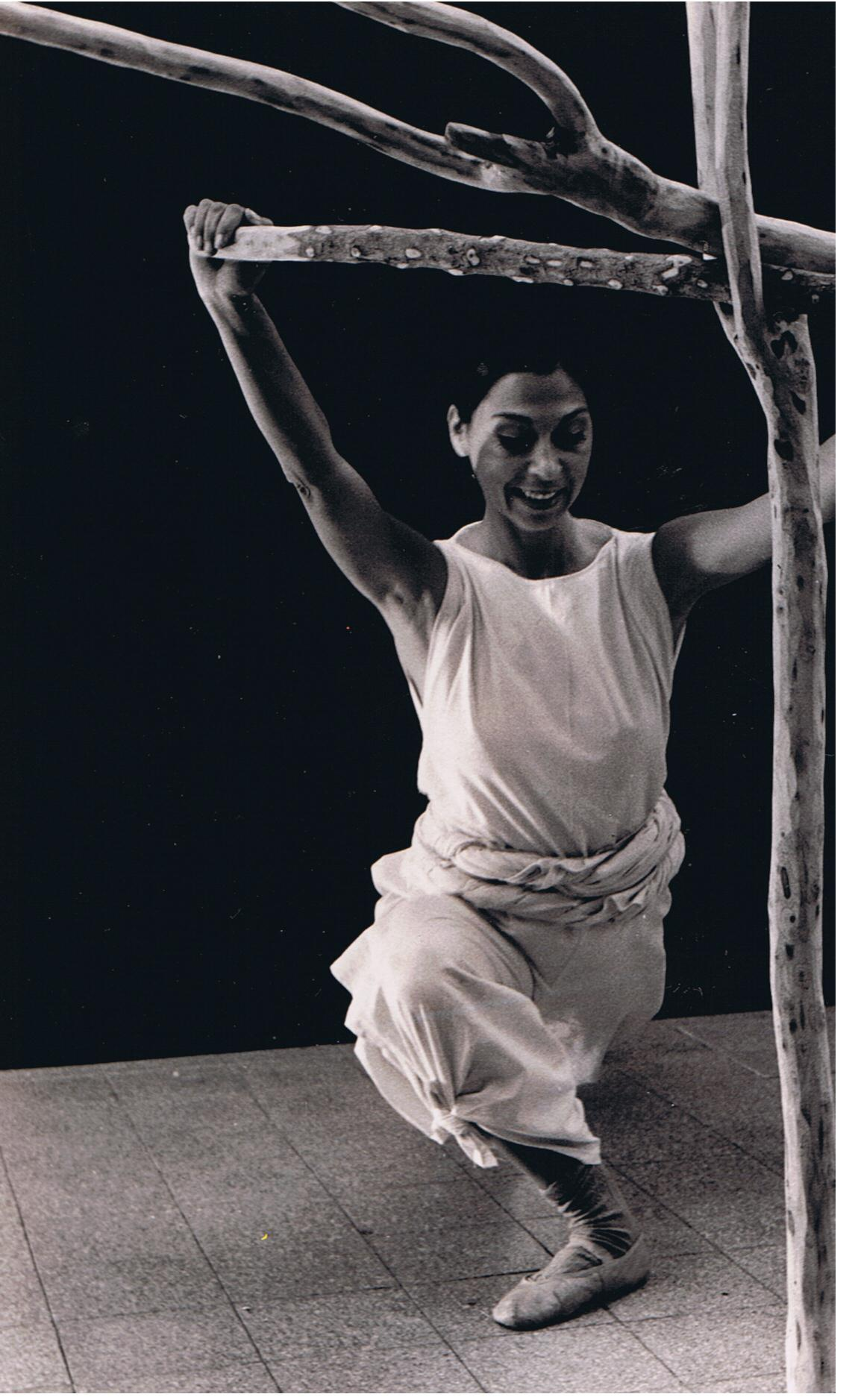 רות אשל היא רקדנית, חוקרת מחול, כוריאוגרפית ומבקרת מחול . ענפים מחותלים , 1983, כוריאוגרפיה וריקוד- רות אשל, צילום - אברהם אילת